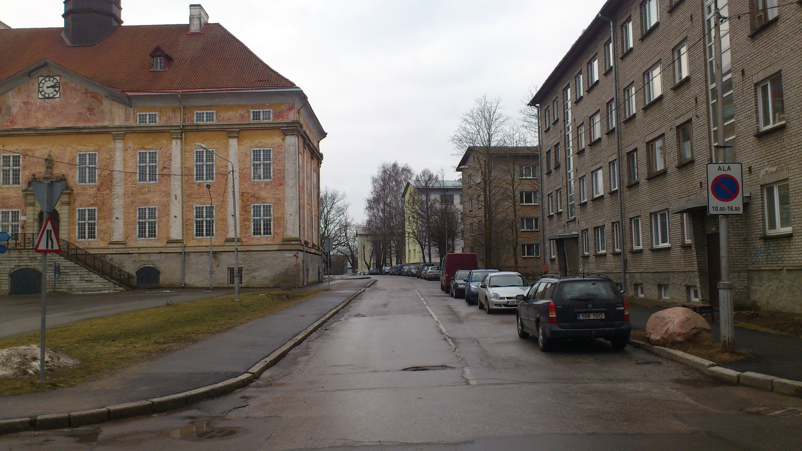 Rüütli tänav, Narva raekoda